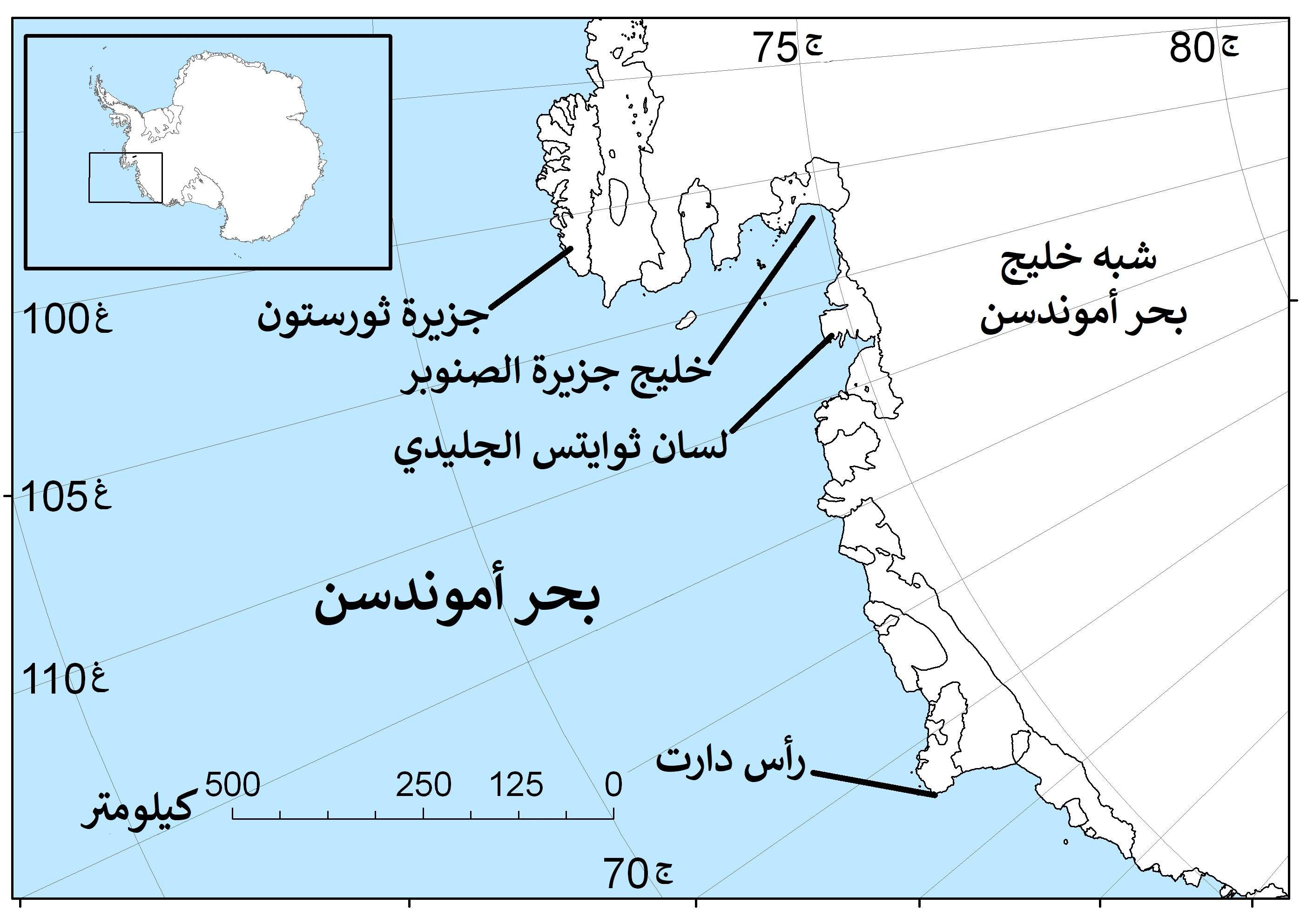 خريطة تُظهرُ منطقة بحر أموندسن في القارَّة القُطبيَّة الجنوبيَّة.